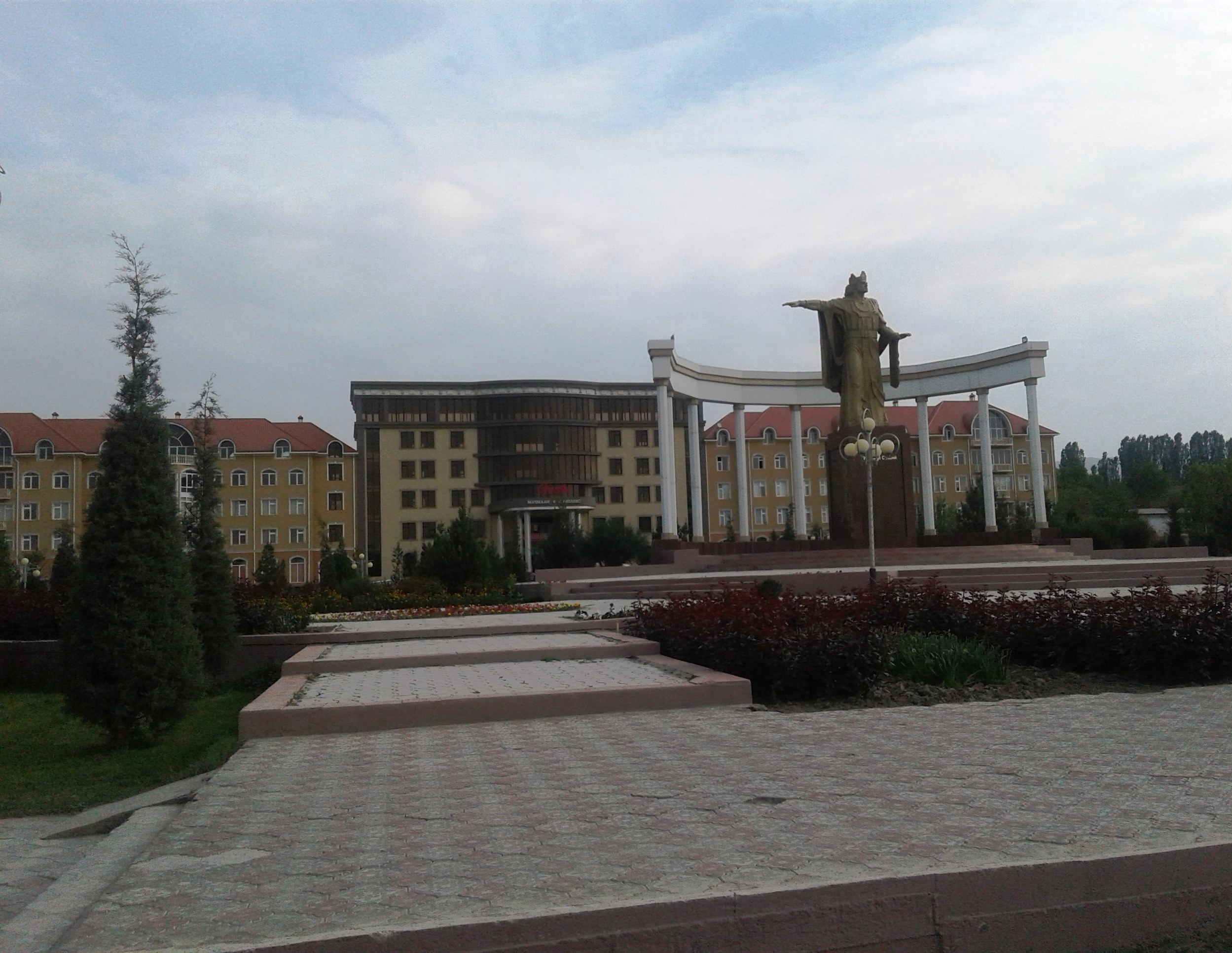 Парк культуры и отдыха г. Исфара Согдийской области, Таджикистан. Памятник поэту Сайфу Исфаранги